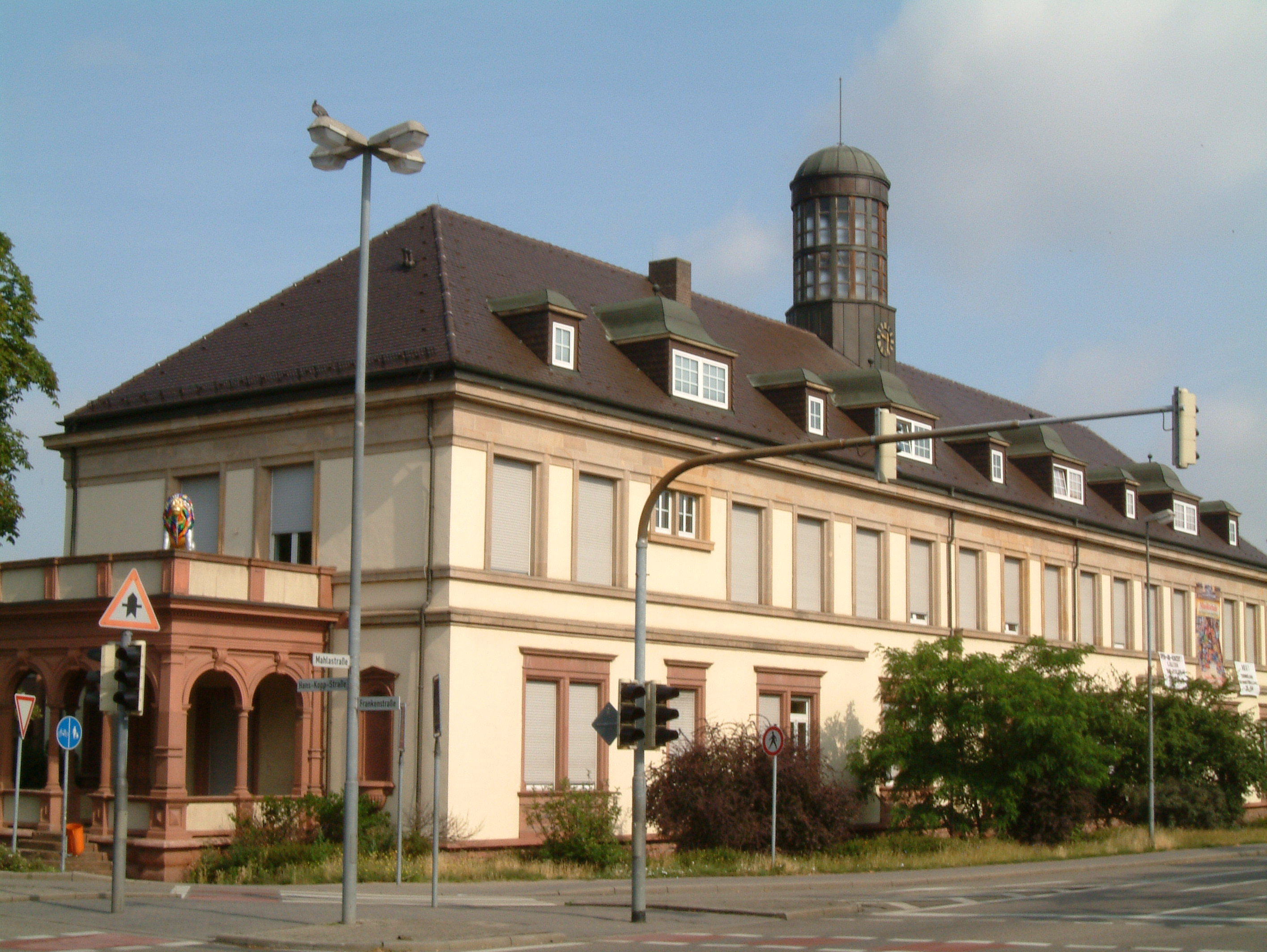 Ehemaliges Verwaltungsgebäude der Zuckerfabrik zu Frankenthal, selbst fotografiert am 06.07.2006 und freigegeben durch Benutzer:Mundartpoet